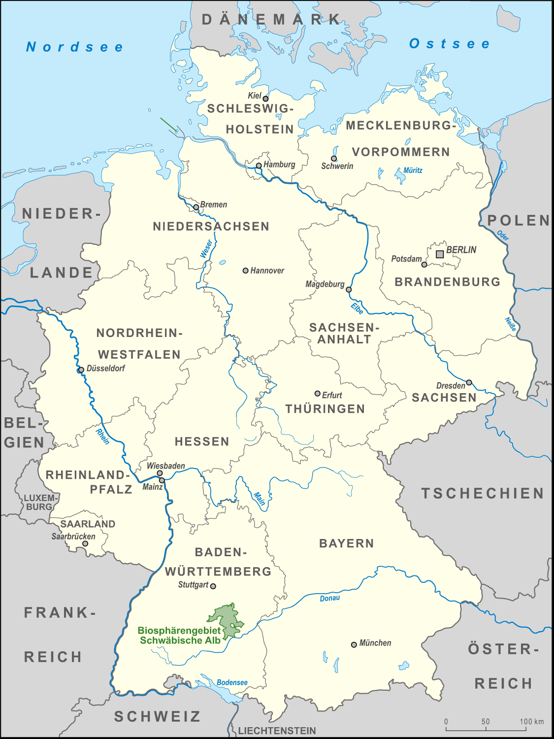 Karte des Biosphärenreservates Schwäbische Alb in Deutschland